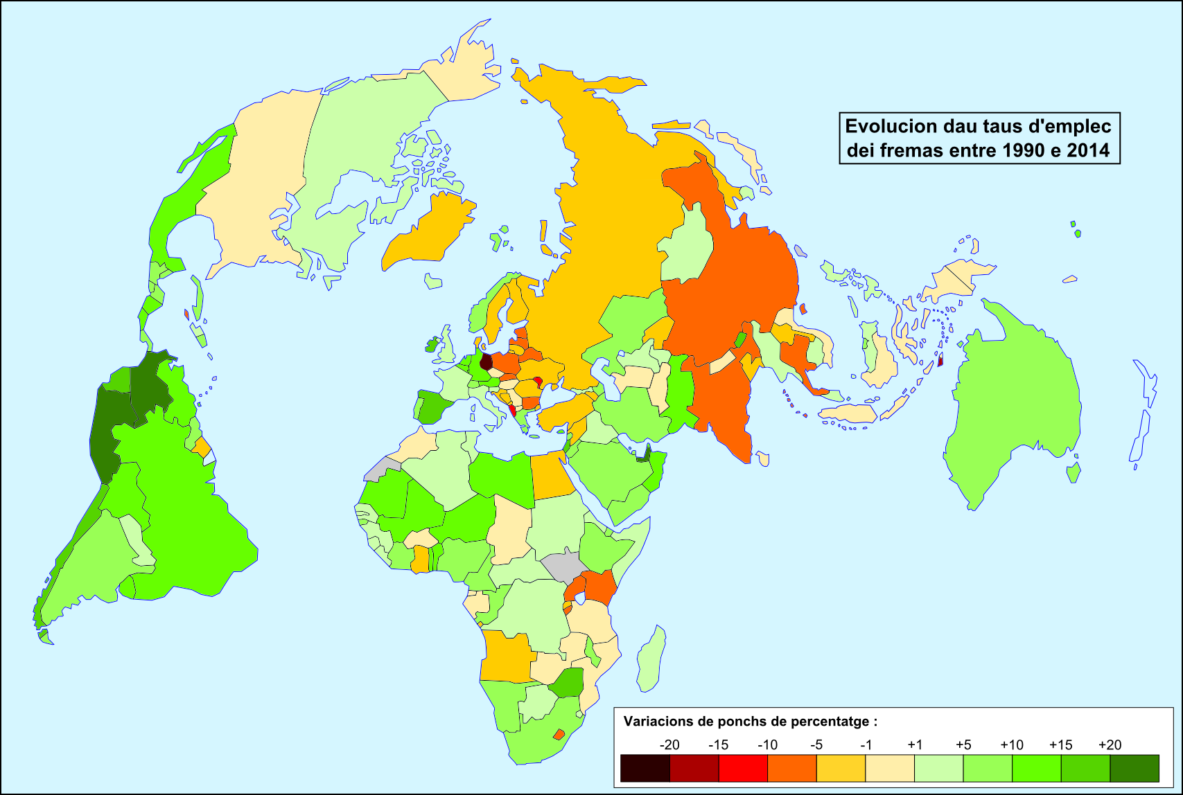 Evolucion dau taus d'emplec dei fremas entre 1990 e 2014